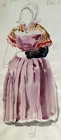 François Hippolyte Lalaisse : Femme de Ploudaniel, étude de costume (partie d'un tableau se trouvant au MuCEM, Musée des Civilisations de l'Europe et de la Méditerranée)